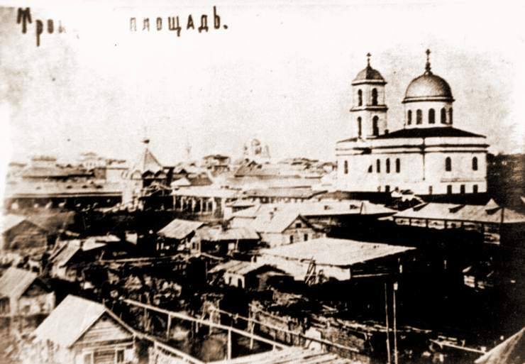 Самара. Троицкая площадь (Троицкий рынок). Слева видна церковь-часовня во имя Воздвижения Честного и Животворящего Креста Господня